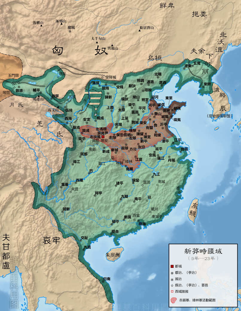 新莽时期疆域图Map of China under the Xin Dynasty